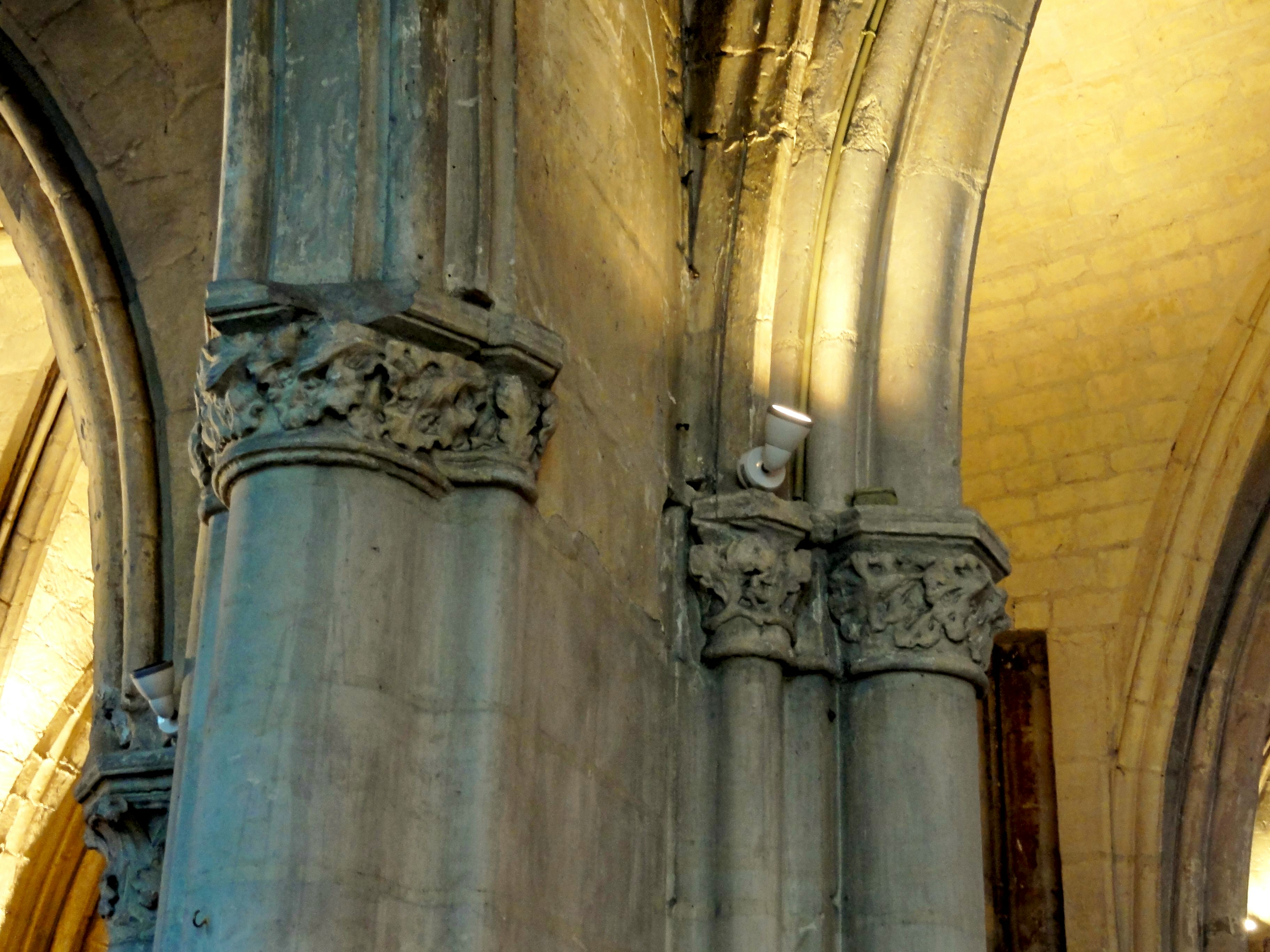 Chapiteau à la retombée de la seconde grande arcade au sud de l'ancien chœur côté ouest (au centre) ; à gauche, chapiteau du doubleau intermédiaire de l'ancien collatéral sud ; à droite, chapiteau du doubleau intermédiaire de l'ancien chœur.